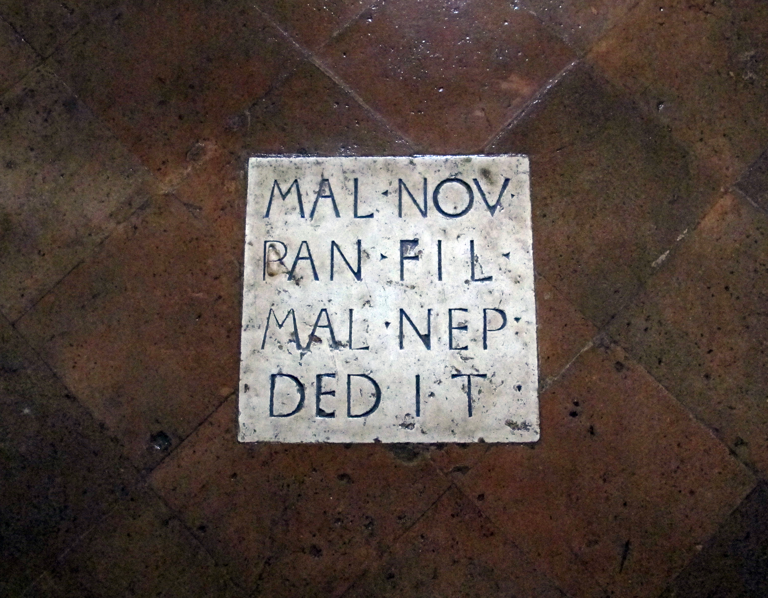 Biblioteca Malatestiana - MIBAC This is a photo of a monument which is part of cultural heritage of Italy.